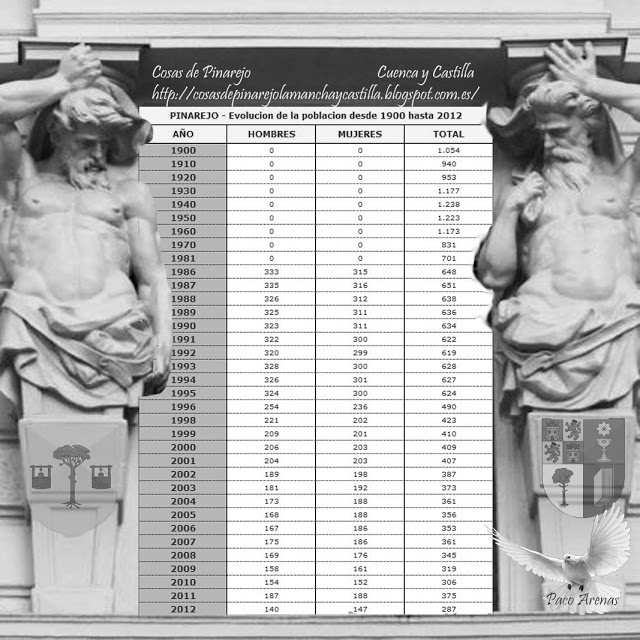 Evolución de la población en Pinarejo desde 1900 a 2012